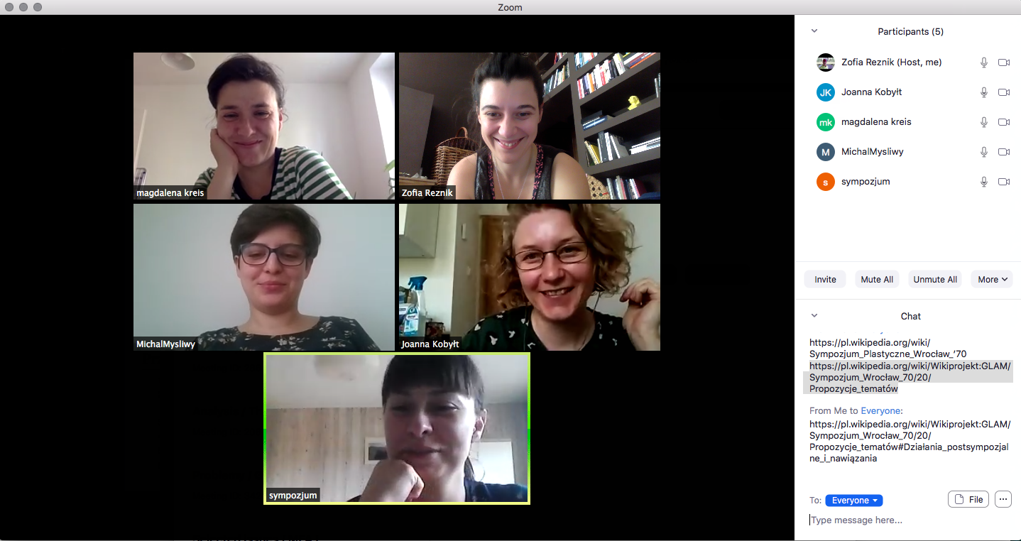 Kolektyw Kariatyda, Edyton #70/20, 9.5.2020 – maraton edycji hasła o Sympozjum Plastycznym Wrocław '70 w ramach roku jubileuszowego pn. Sympozjum Wrocław 70/20. Uczestniczki: Joanna Kobyłt, Magdalena Kreis, Nina Adelajda Olczak, Honorata Rajca, Zofia Reznik, Małgorzata Rzerzycha-Myśliwy, Agnieszka Szkopek, prowadzące: Joanna Kobyłt, Zofia Reznik. Wikiprojekt